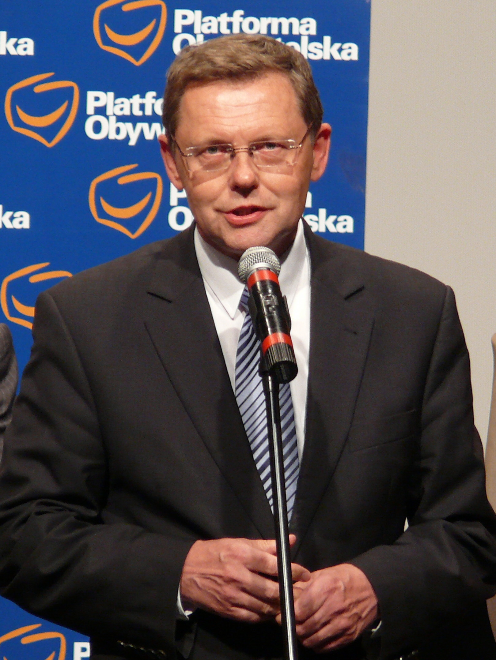 Tomasz Nowak - poseł na Sejm RP